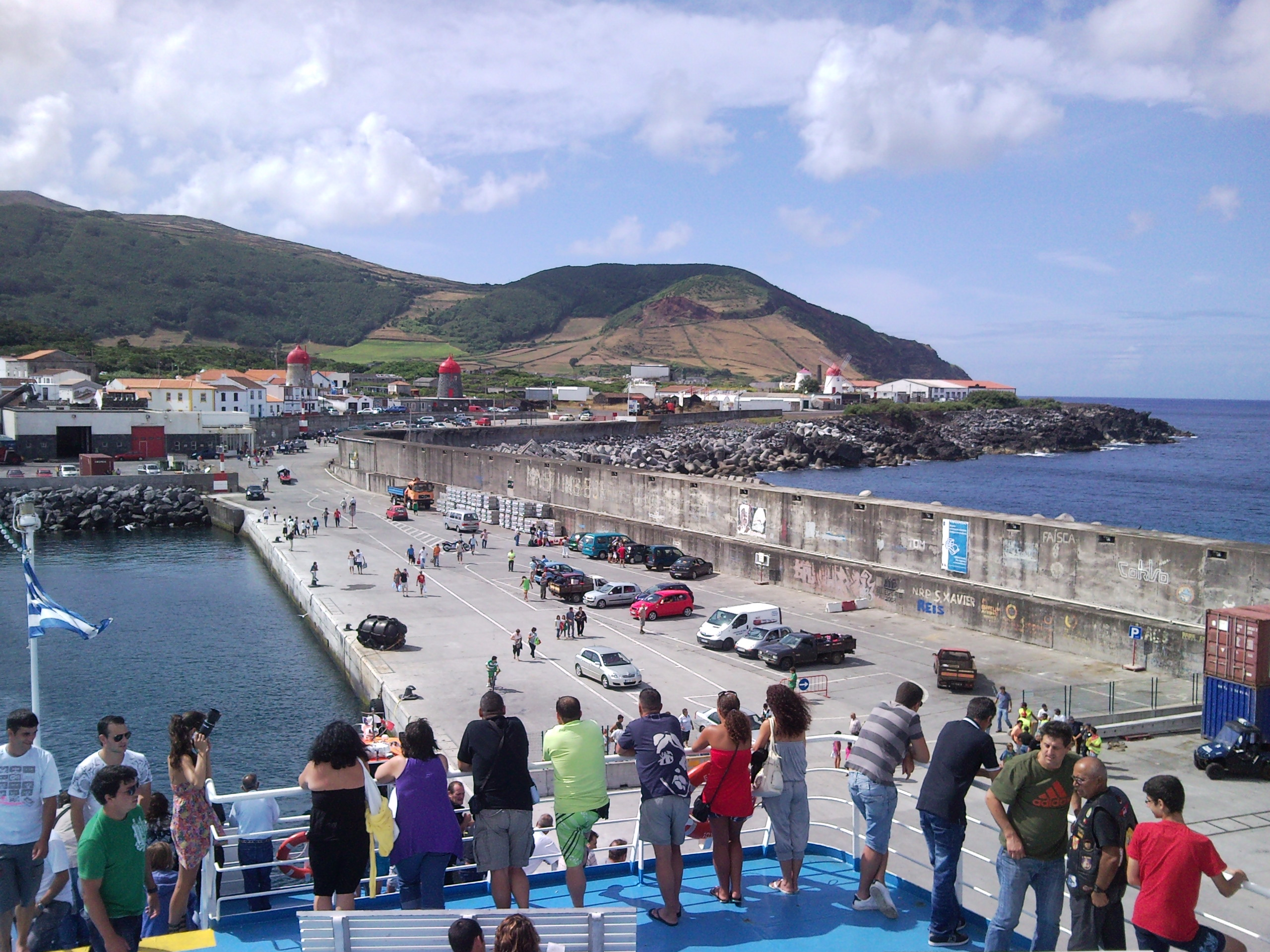 Porto da Vila da Praia, ilha Graciosa, Açores, Portrugal